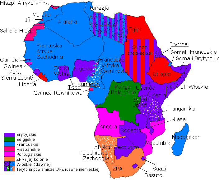 Kolonie w Afryce, 1947